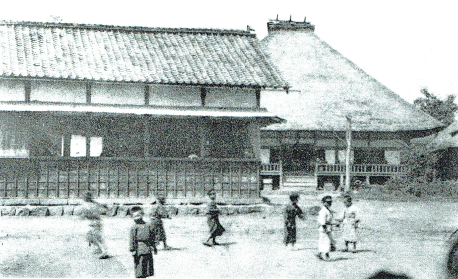 庭で遊ぶ中田尋常小学校の児童たち（明治末ころ）